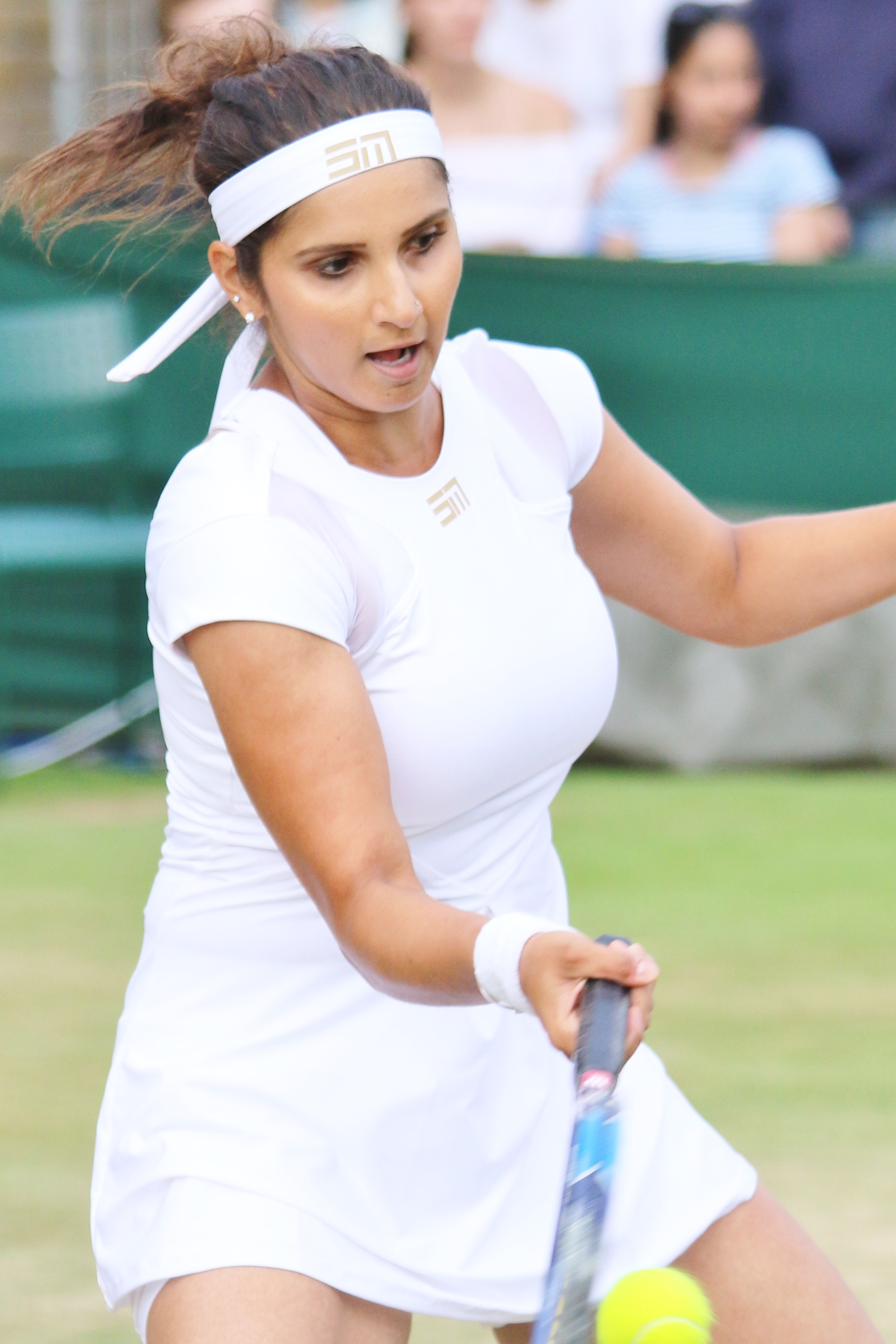 Mirza WM17 (7)